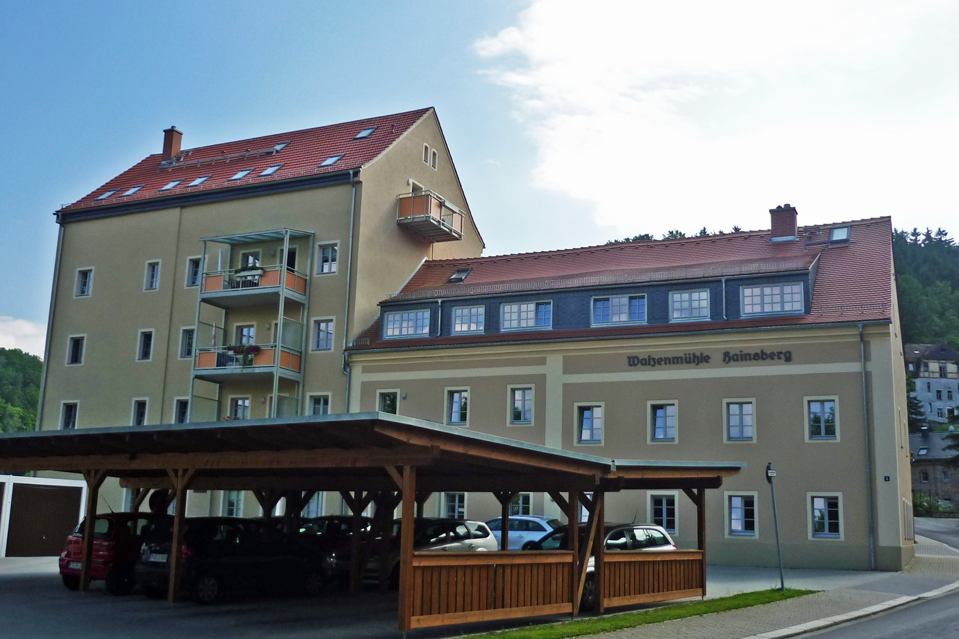 Ehemalige Walzenmühle, Somsdorfer Str. 4 in Freital-Hainsberg